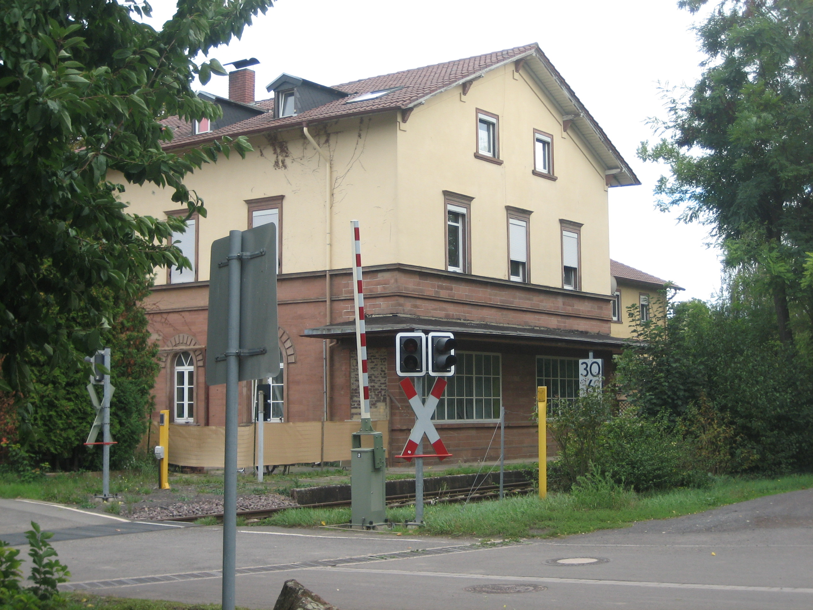 Bezeichnung: Bahnhof Lage: Bahnhofstraße 33 Ort: Albsheim an der Eis, Obrigheim (Pfalz) Bauzeit: 1872/73 Beschreibung:ehemaliger Bahnhof; spätklassizistischer Typenbau mit angeschobenem Güterschuppen